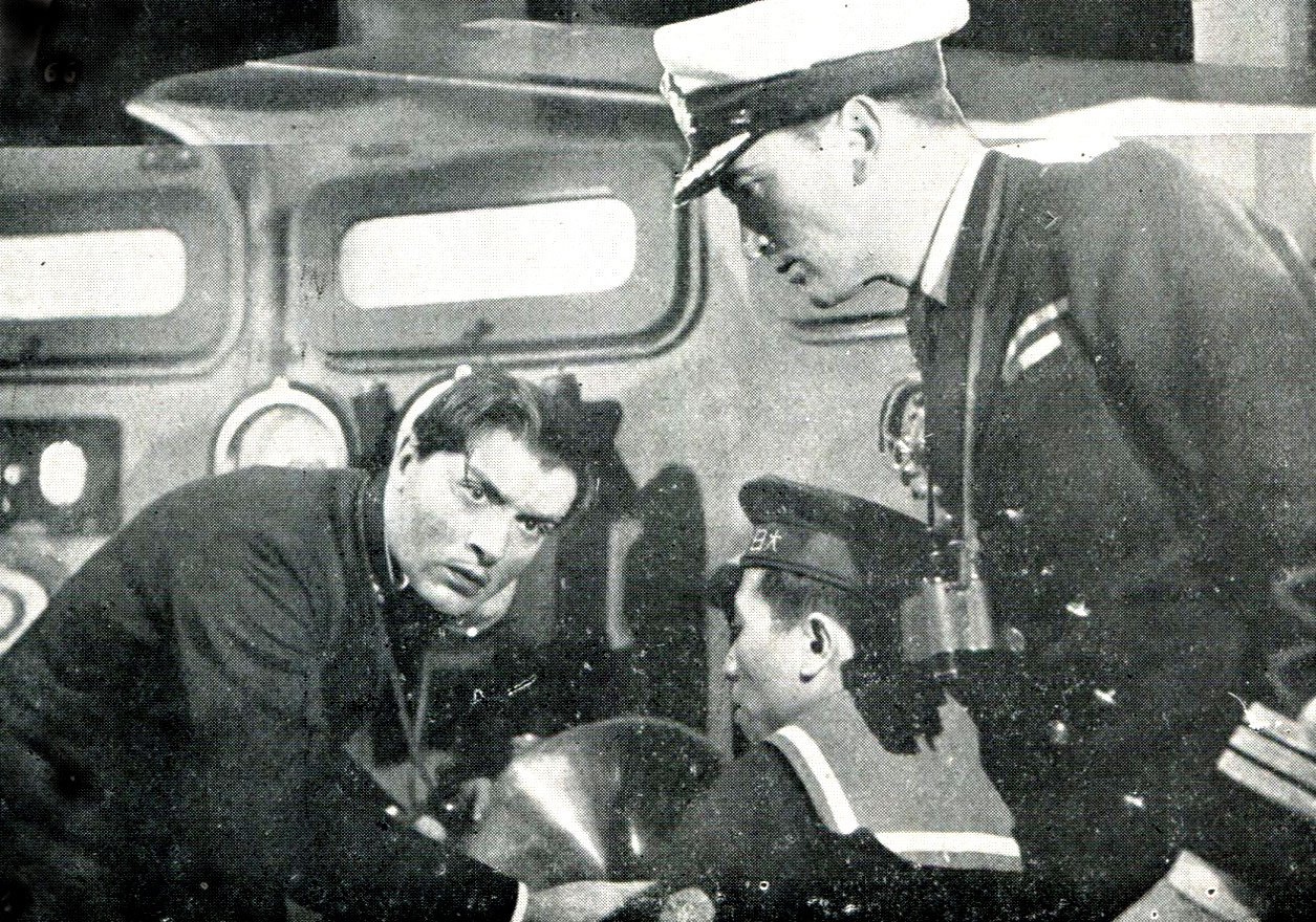 La battaglia (Farkas + Touriansky, 1934) - foto di scena